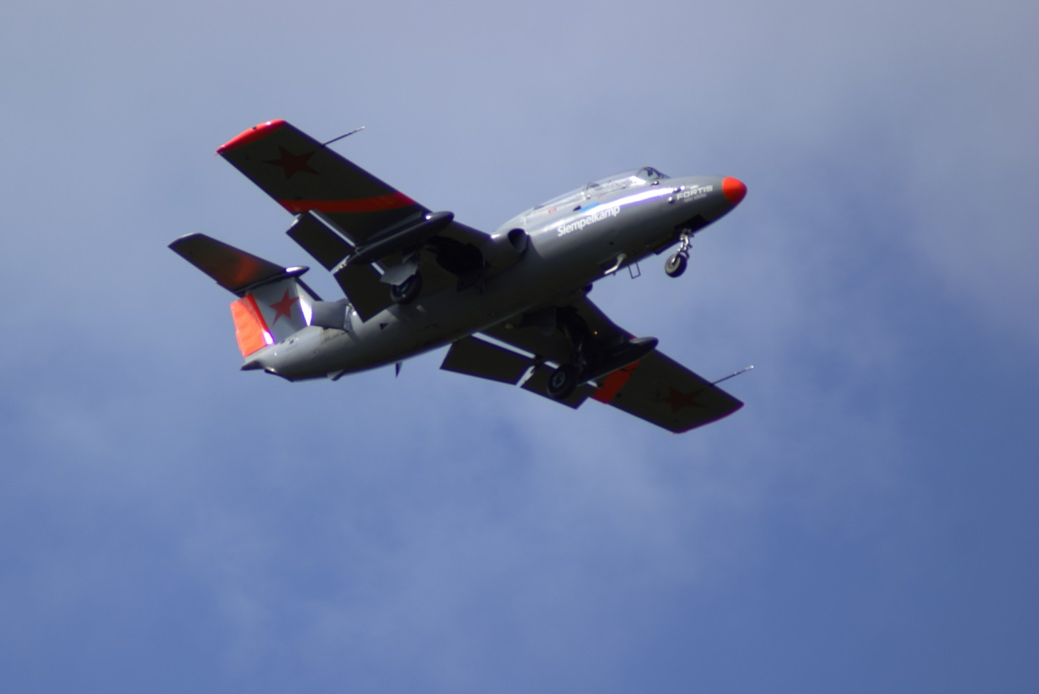 Aero L-29 beim 15. Oldtimer-Fliegertreffen auf der Hahnweide